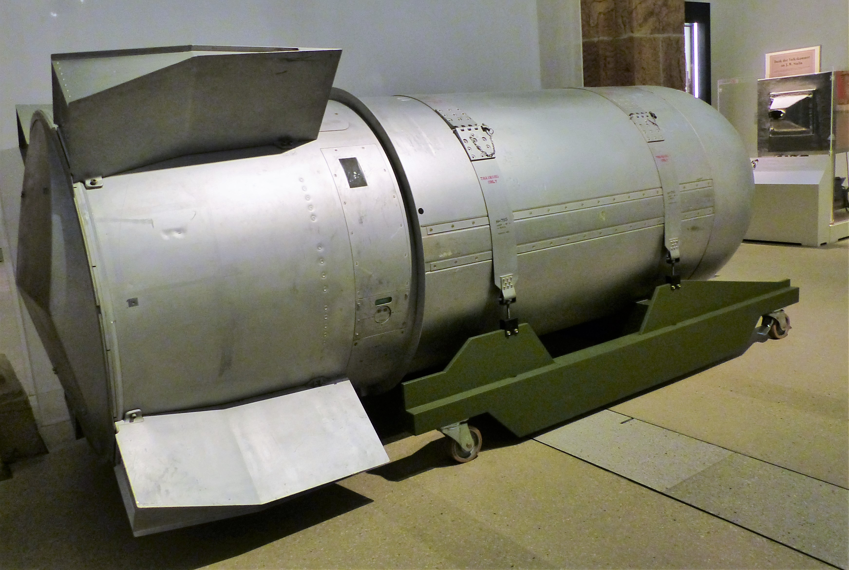 B-53-Wasserstoffbombe, Exponat im Militärhistorischen Museum der Bundeswehr, Dresden